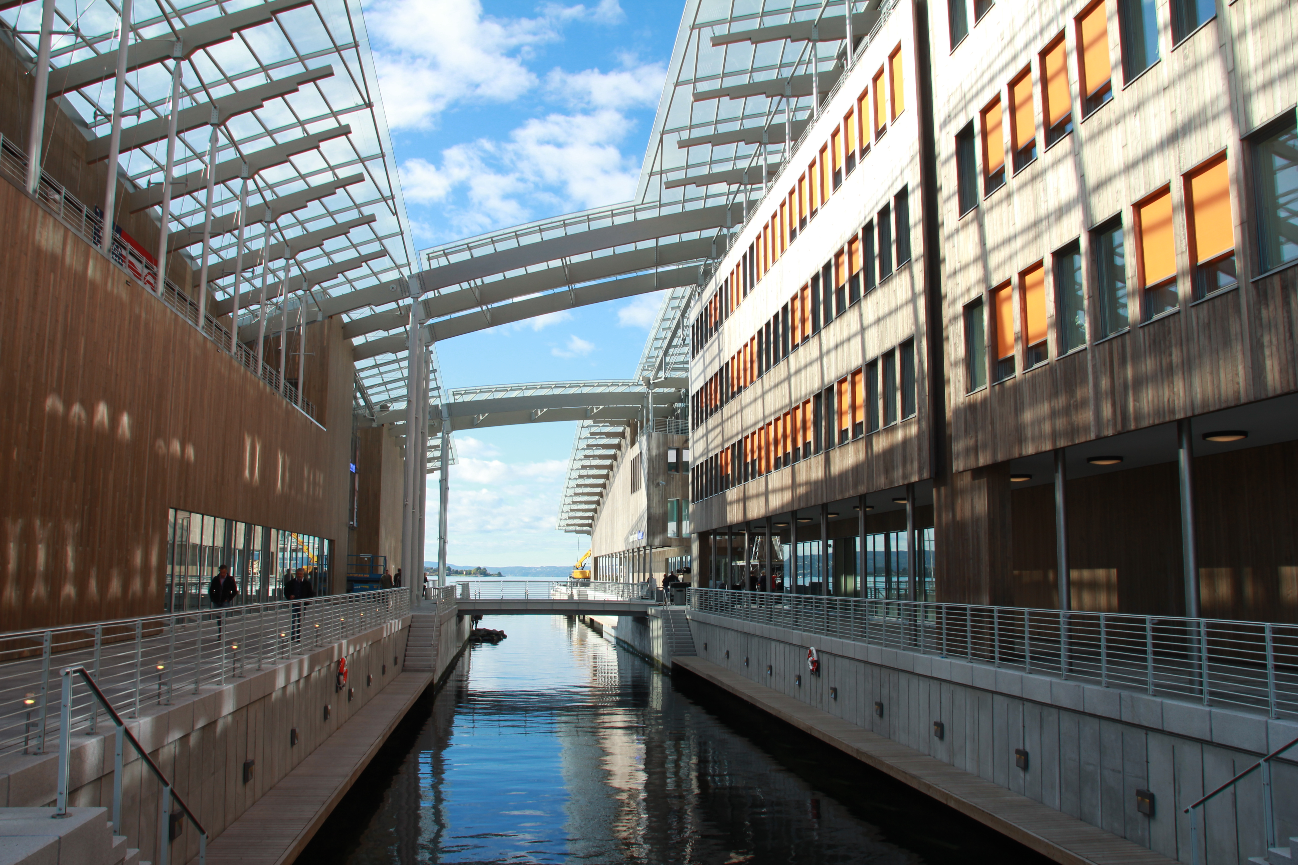 Astrup Fearnley Museet for Moderne Kunst, Oslo. Oppført 2012. Arkitekt Renzo Piano.